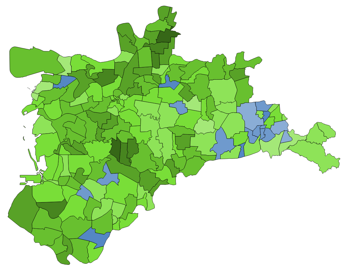 顏色對照表